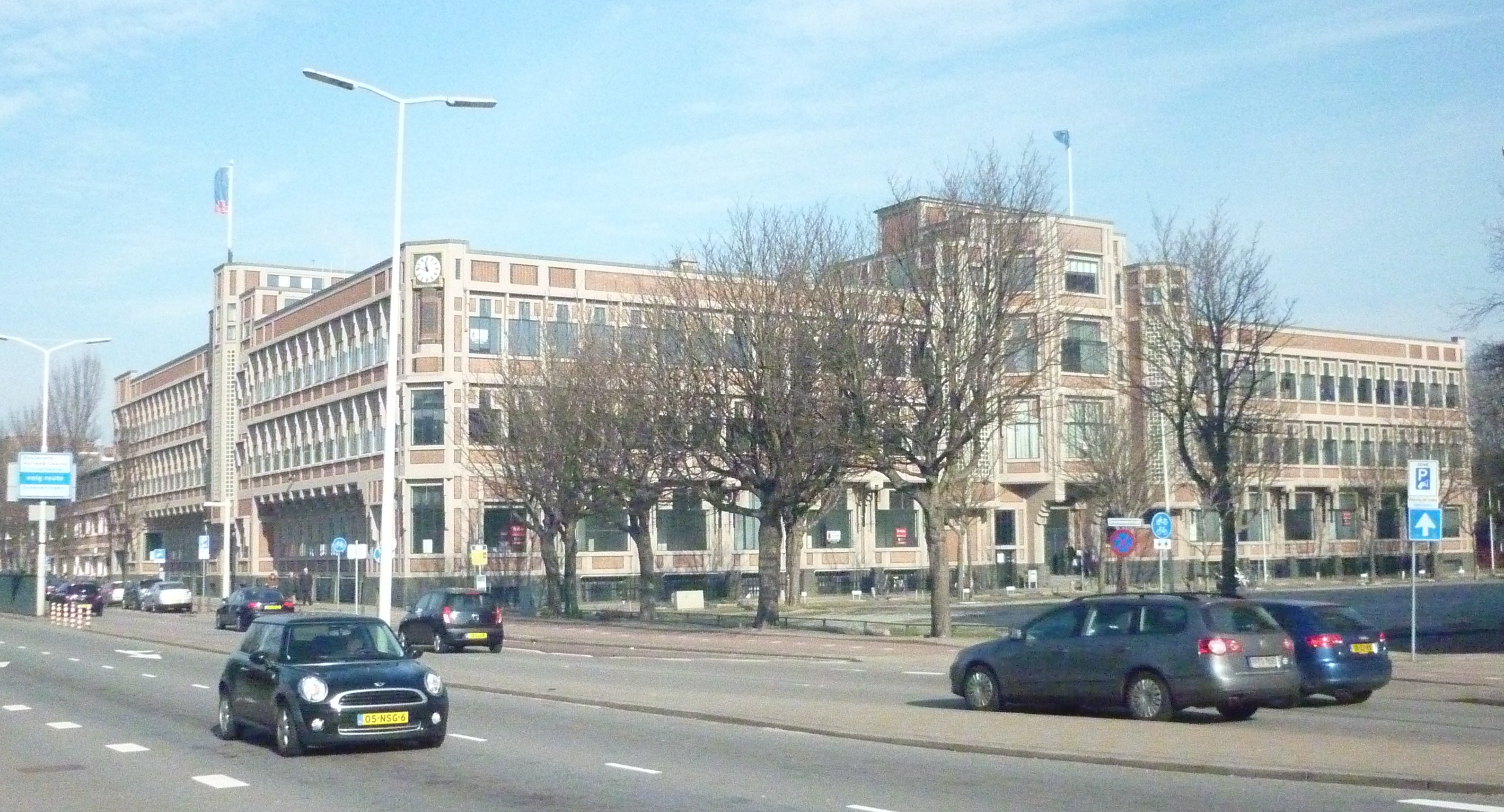 kantoor Nationale Nederlanden, Groenhovenstraat, Den Haag, gebouwd door Berlage, 1927